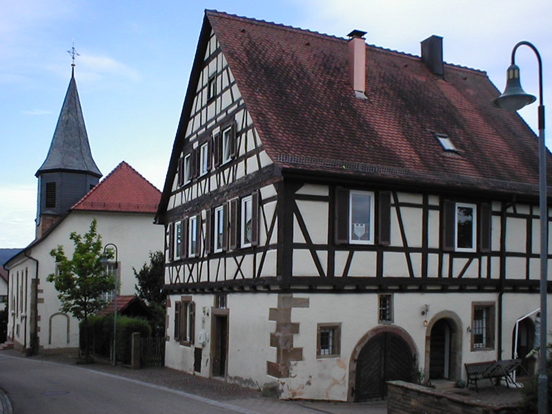 Pfarrkirche und Pfarrhaus in Cleebronn